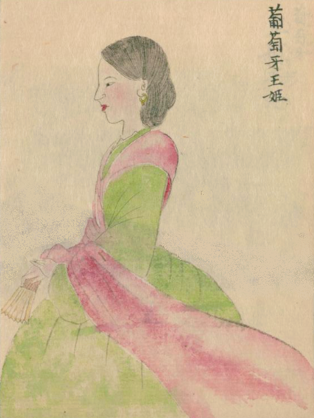 ルイス1世 (ポルトガル王)の妻、マリア・ピア・デ・サボイア 高嶋祐啓『欧西行紀』